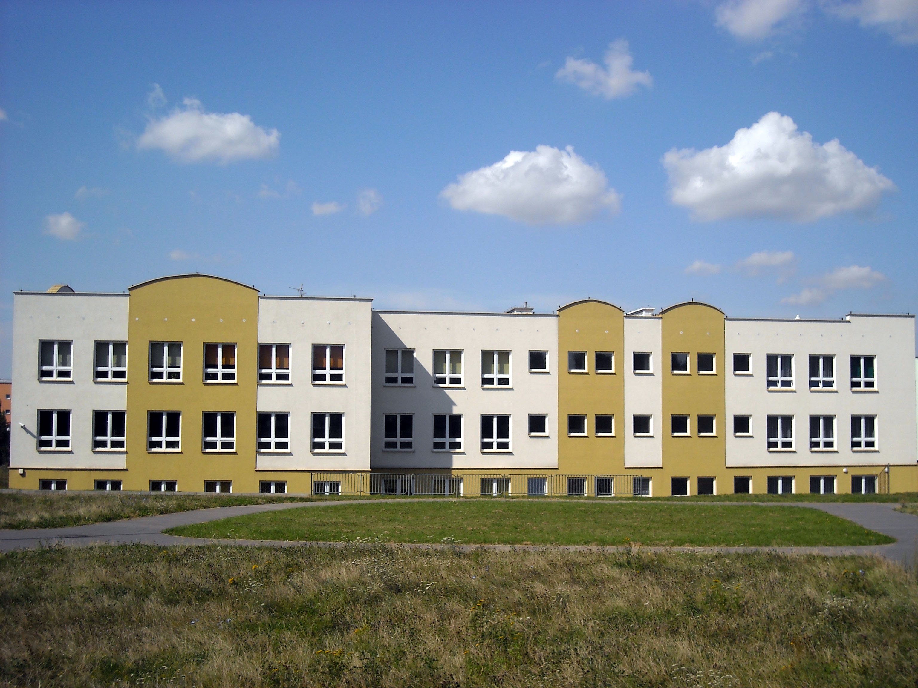 Budynek Gimnazjum nr 3 w Lublinie na osiedlu Nałkowskich w dzielnicy Wrotków (miniatura)